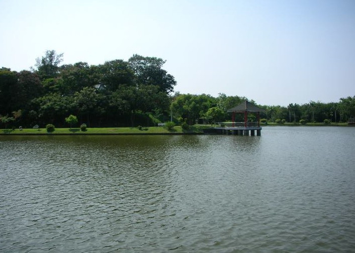 人工開闢的黃埔湖